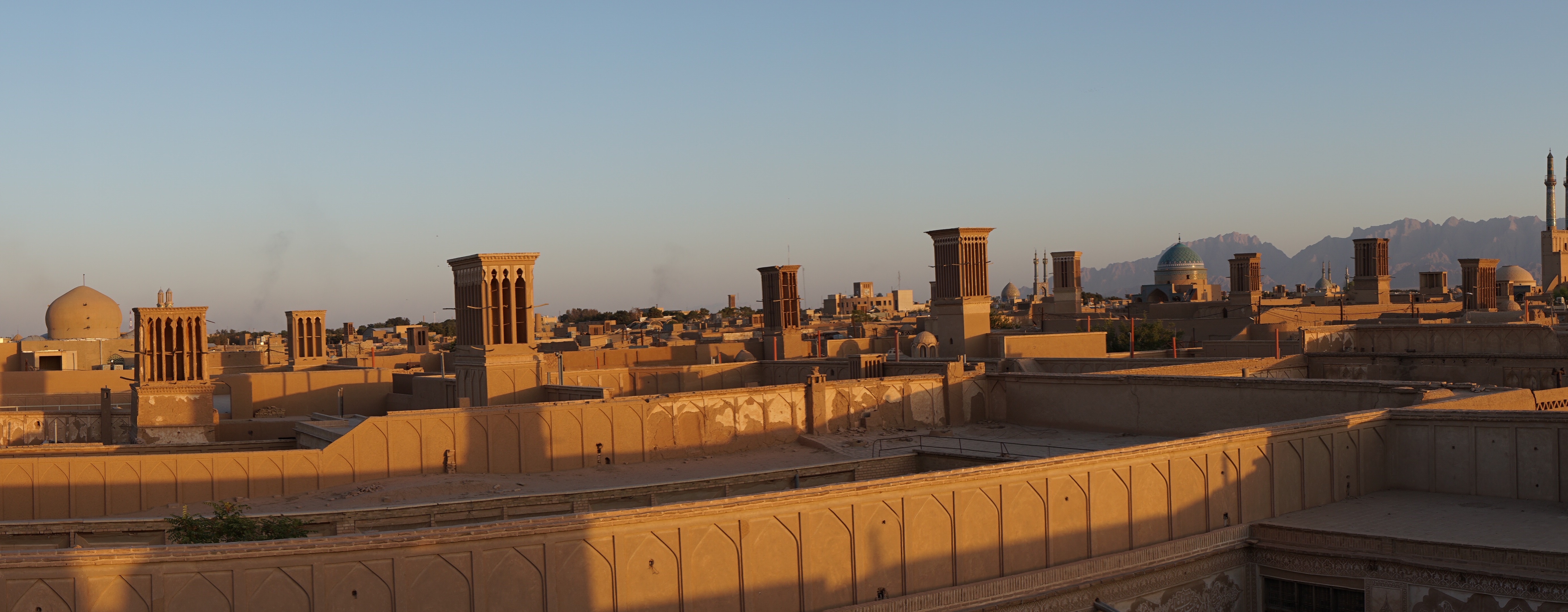 بخشی از خط آسمان شهر تاریخی یزد